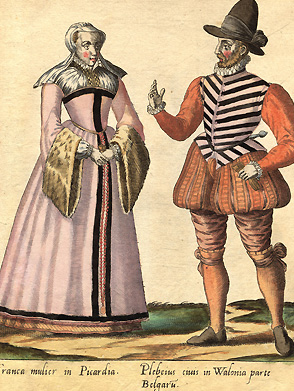 Planche 26 (detail) of Abraham de Bruyn's Omnium poene Gentium Imagines (1577)